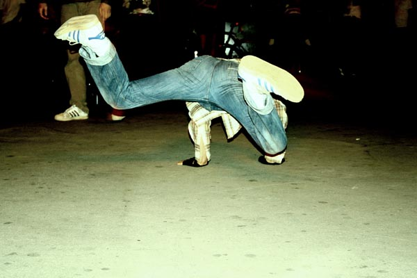 break dance dancer